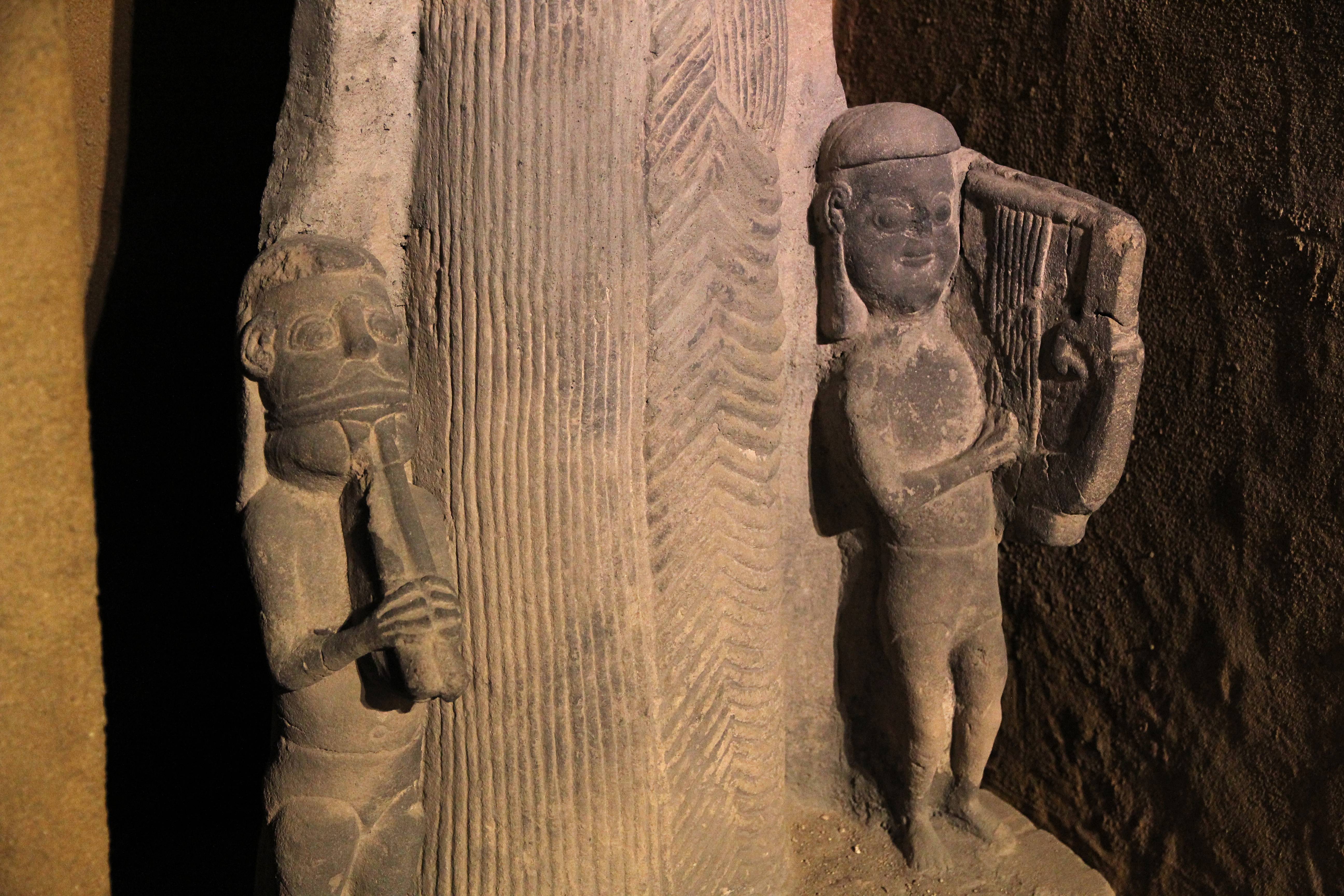 Detail der Kybele-Statue aus einem phrygischen Torbau auf dem Hügel Büyükkale in der hethitischen Hauptstadt Ḫattuša, Museum für anatolische Zivilisationen, Ankara